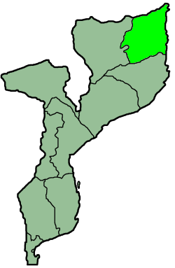 Map of Cabo Delgado Province, Mozambique